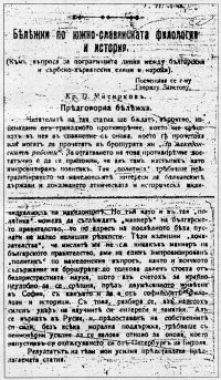 Посвещението на г-н Гаврил Занетов